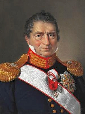 Danish Rear Admiral Johan Cornelius Krieger (1756-1824)